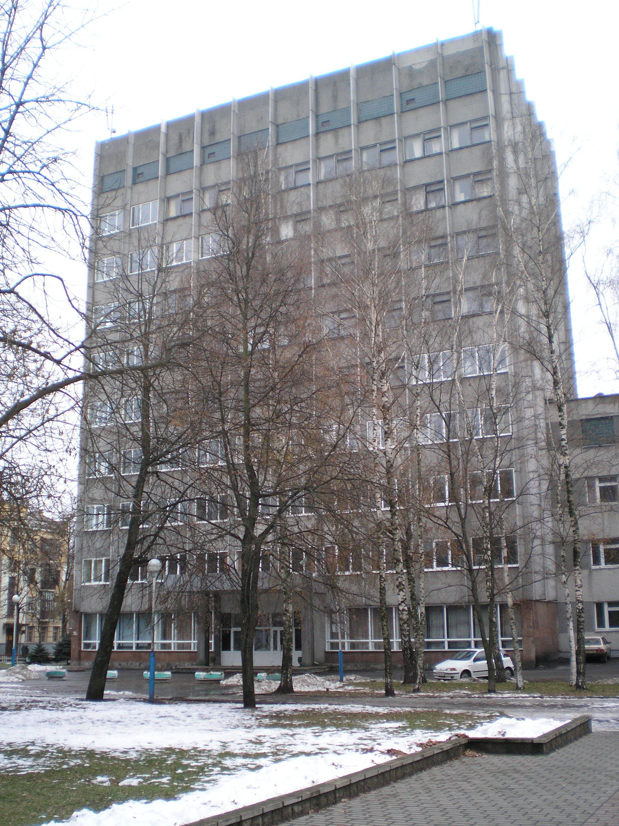 Институт механики металлополимерных систем им. В. А. Белого. ГомельScientific institute in Gomel